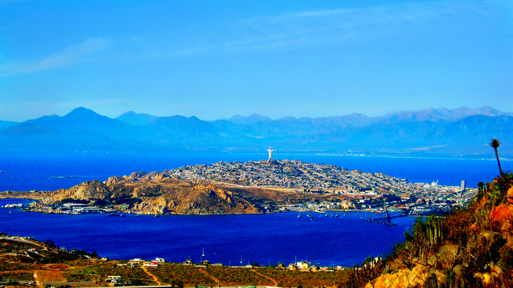 Ciudad de Coquimbo